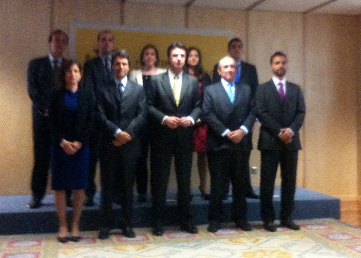 El Ministro de Industria, Energía y Turismo, Jose Manuel Soria recibe a la promoción del año 2011 del Cuerpo de Ingenieros Industriales del Estado